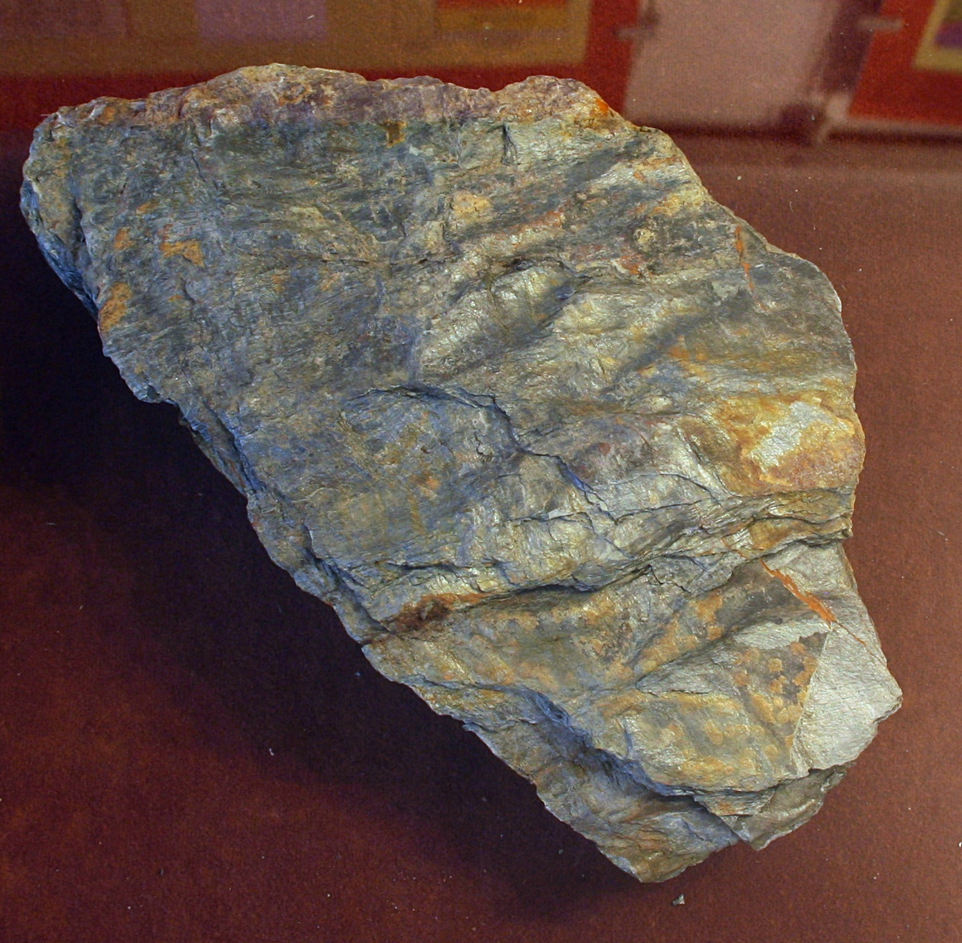 Fyllit z meisjcowosci Panenska Hůrka (Czechy) w Muzeum Złota w Złotoryi